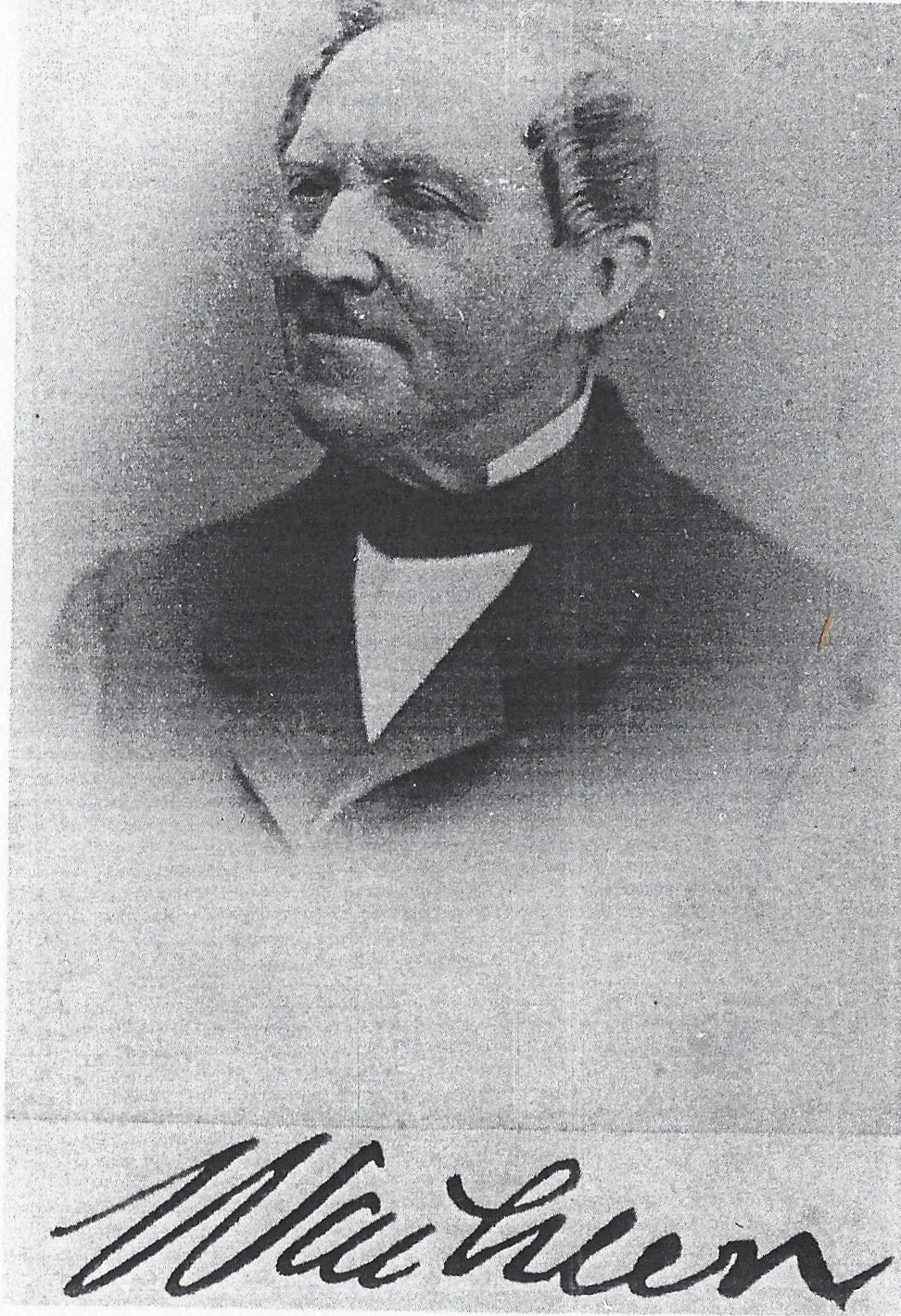 Signierte Porträtfotografie von Ernst Wachler (1803-1888)